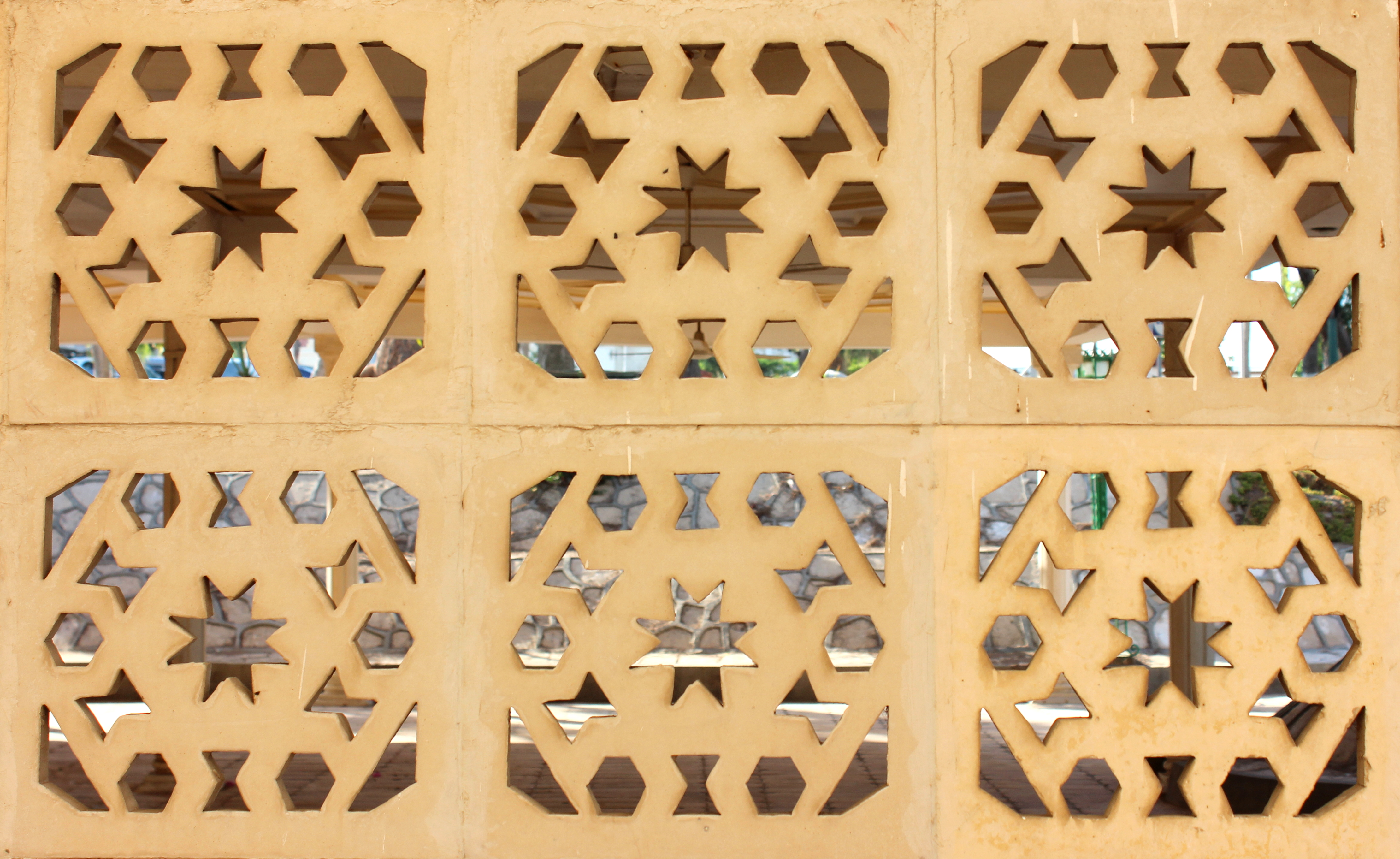 مسجد شيواه ناز بحدائق المنتزه بالإسكندرية.